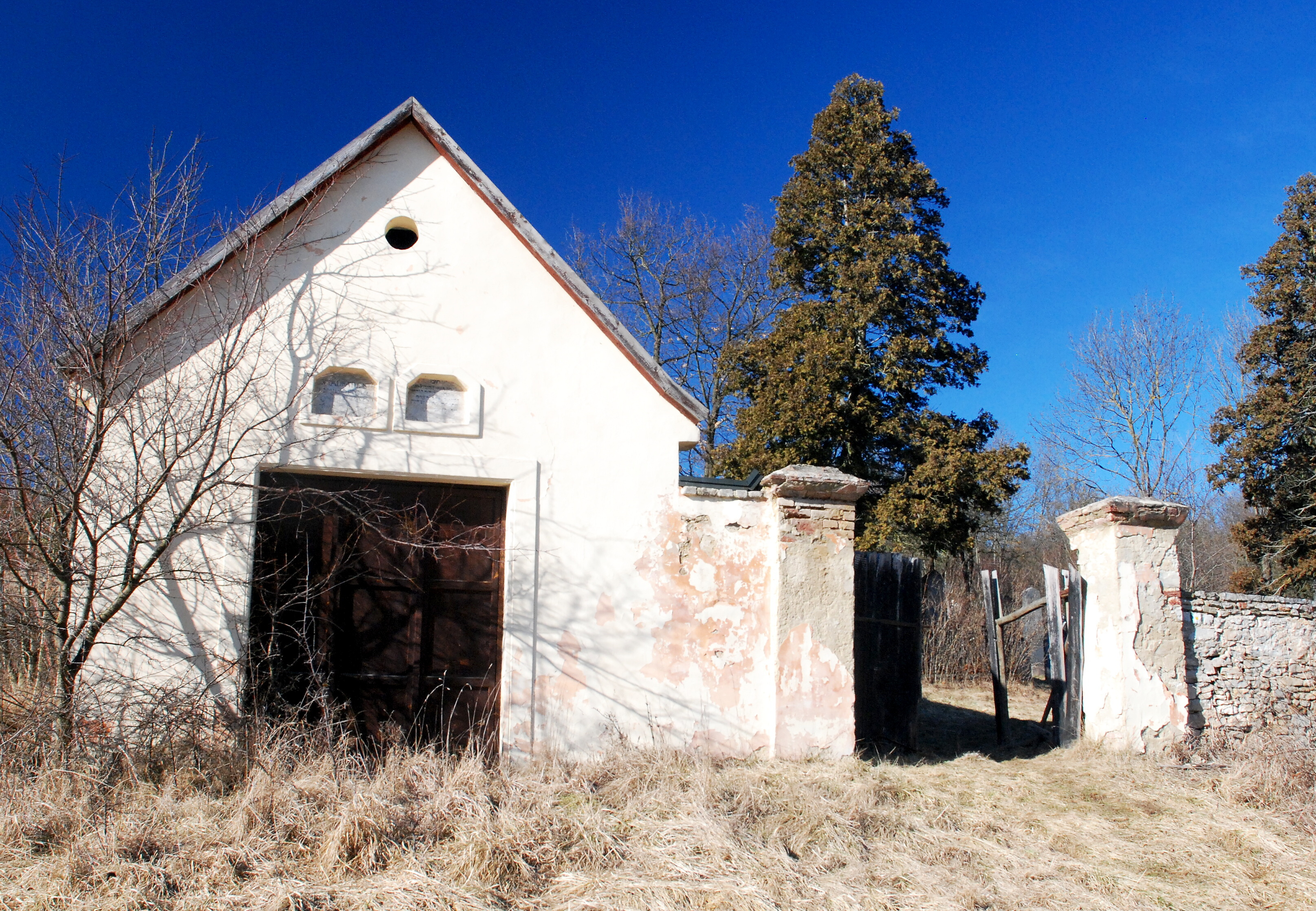 Židovský hřbitov u obce Mořina Project: Židovské památky.